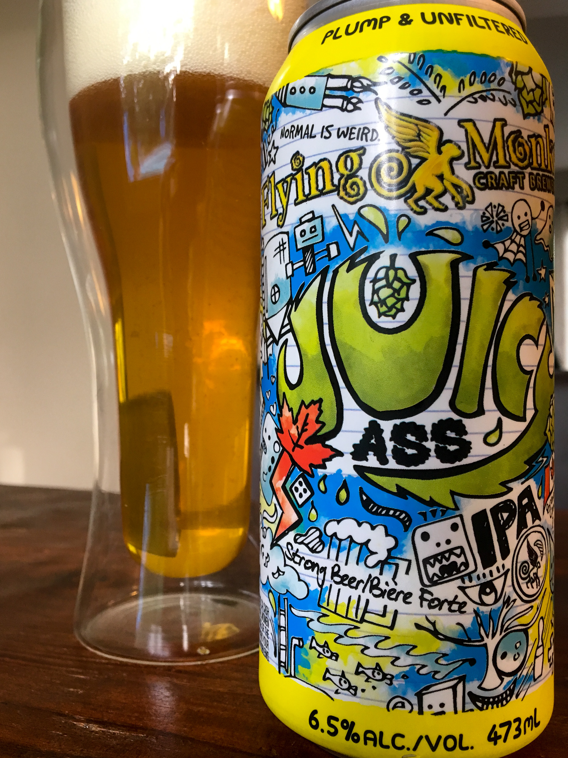 Barrie, ON